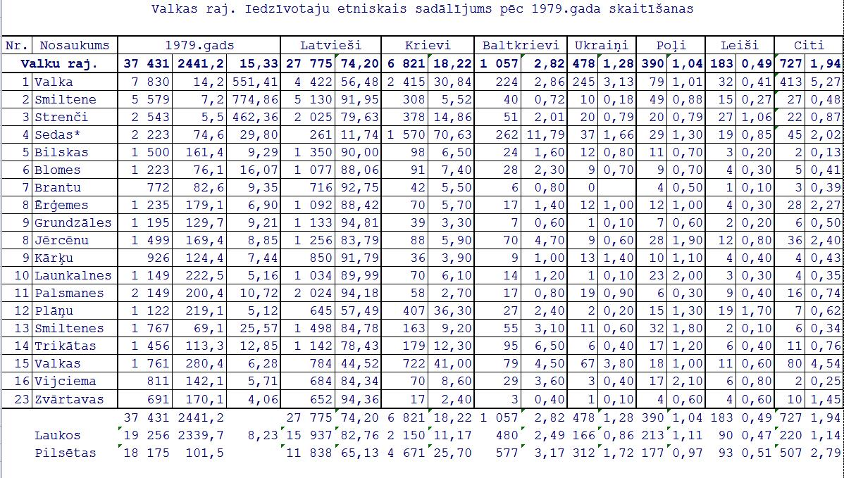 Latvijas 1979. gada tautas skaitīšanas dati